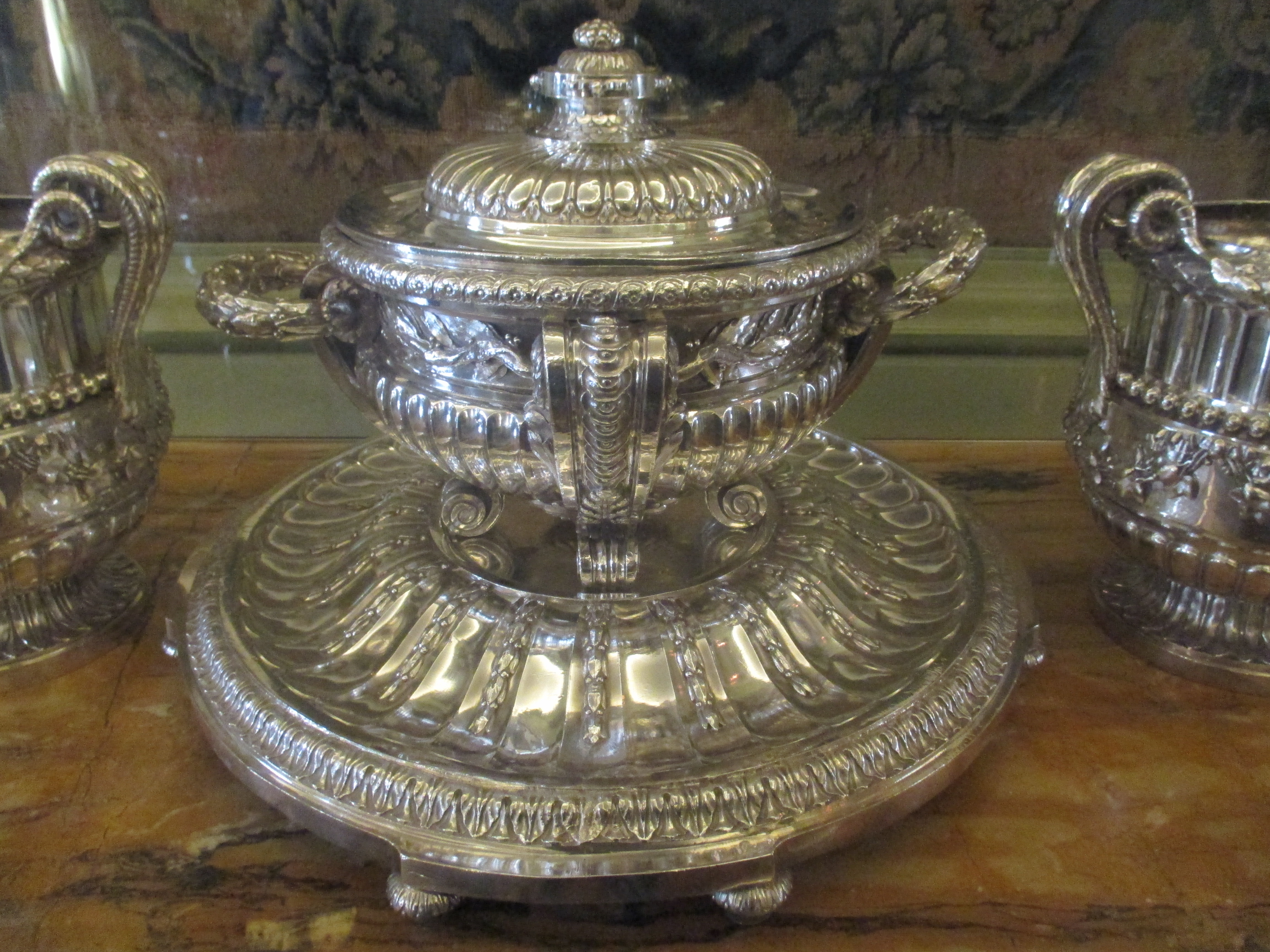 Pot à oille en argent du service Orloff (1770-1771) commandé par Catherine II pour son favori Grégoire Orloff. Salle à manger de l'hôtel Camondo (musée Nissim-de-Camondo) à Paris. Jacques-Nicolas Roettiers.